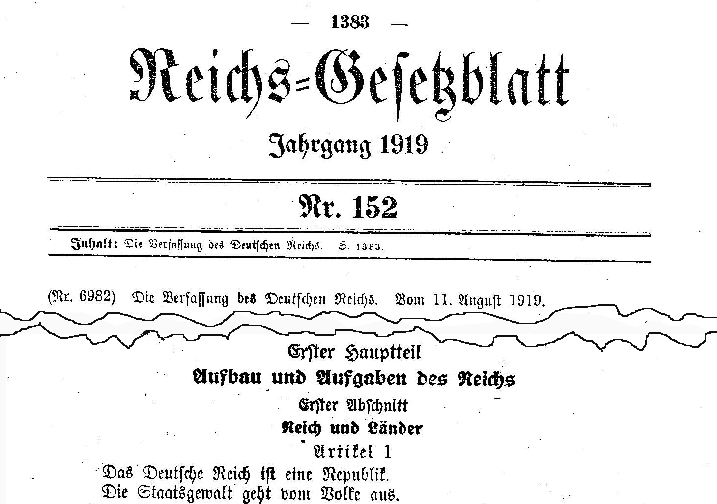 Ausriß: Kopf und Artikel 1